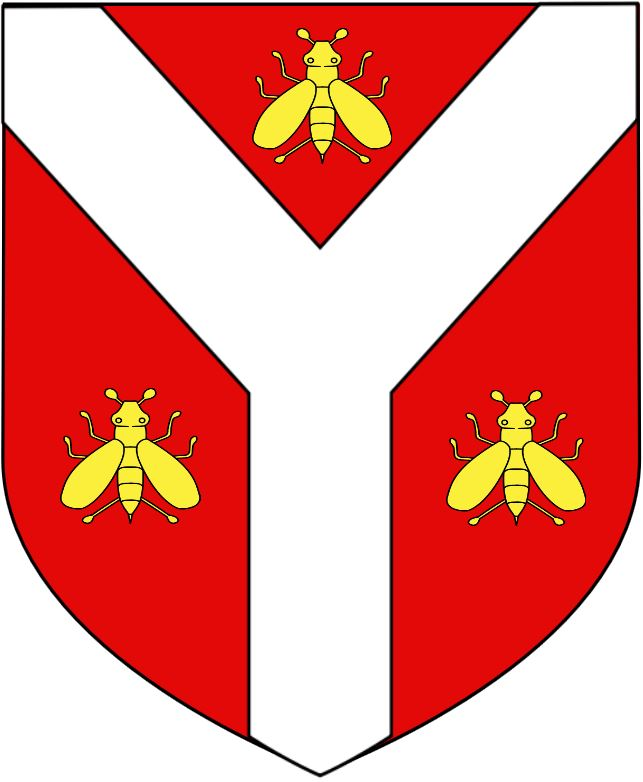 Blason des descendants Biebuyck d'Albert et Eugène Biebuyck: De gueule au pairle d'argent, acc. de trois abeilles d'or, posées 1 et 2. Noblesse belge: Chevalier (primogéniture masculine) - Écuyer